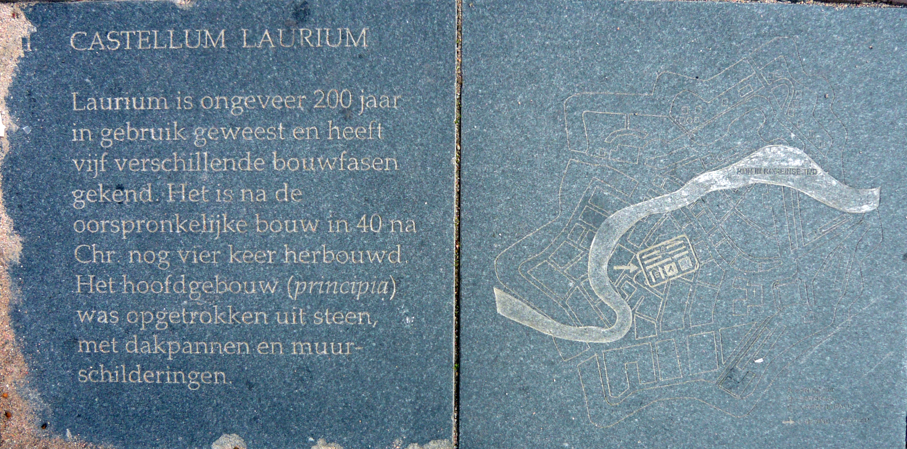 Lage des Kastells Laurium und des Rheines in römischer Zeit, dargestellt auf einer Steinplatte in der Pflasterung des Kerkpleins von Woerden